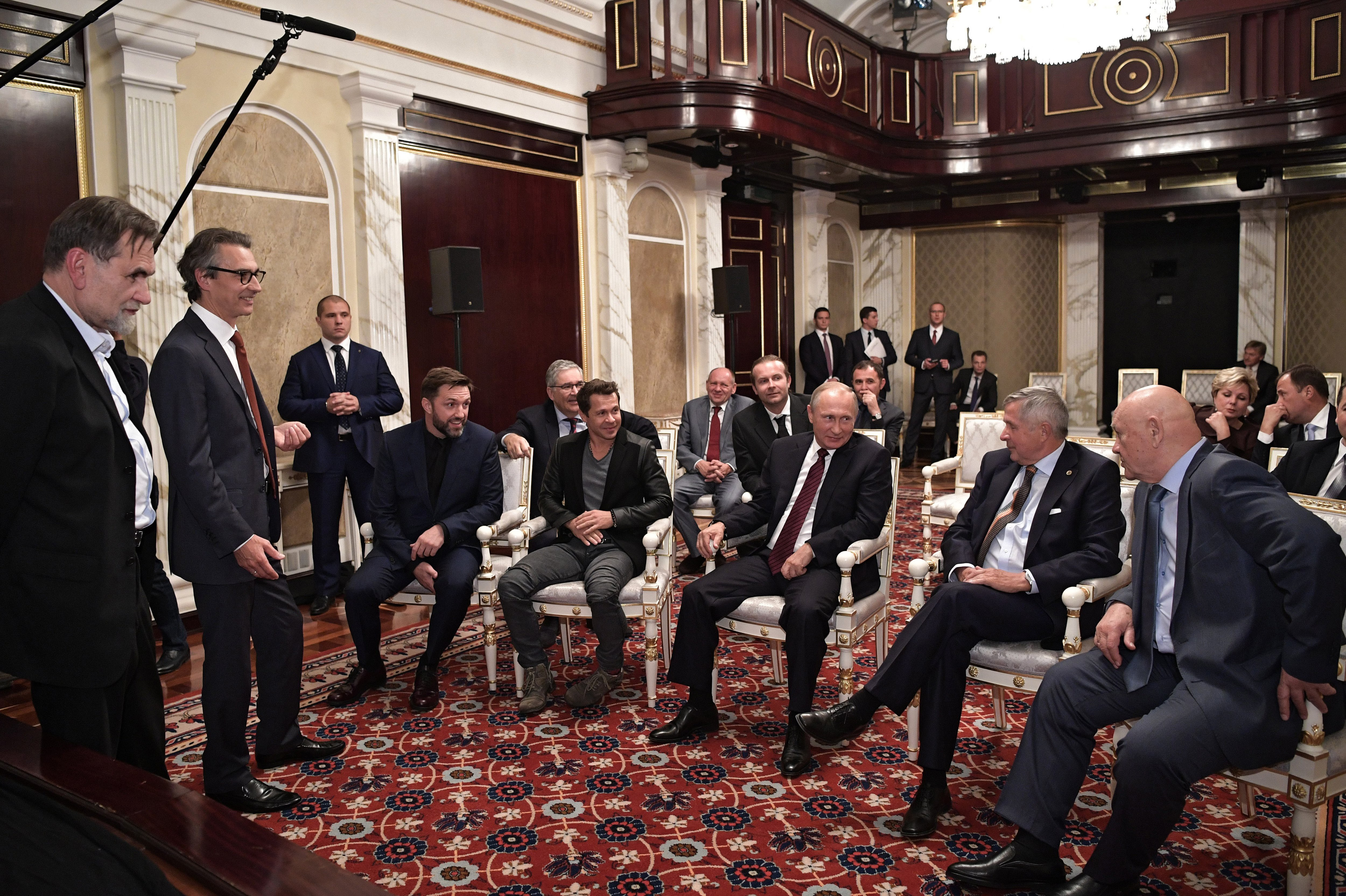 Встреча Президента России Владимира Путина со съёмочной группой фильма «Салют-7».